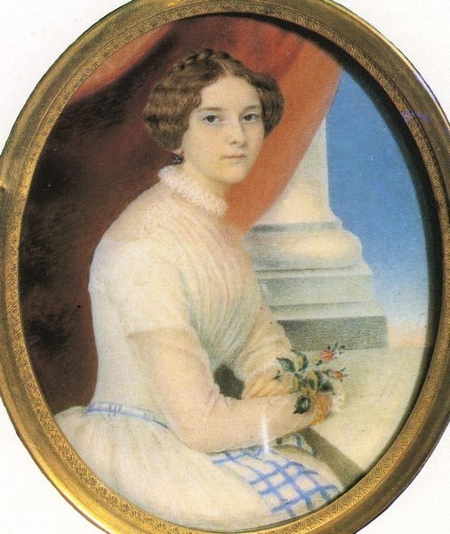 Софья Васильевна Ладомирская (1831—1880), в замужестве графиня Апраксина.